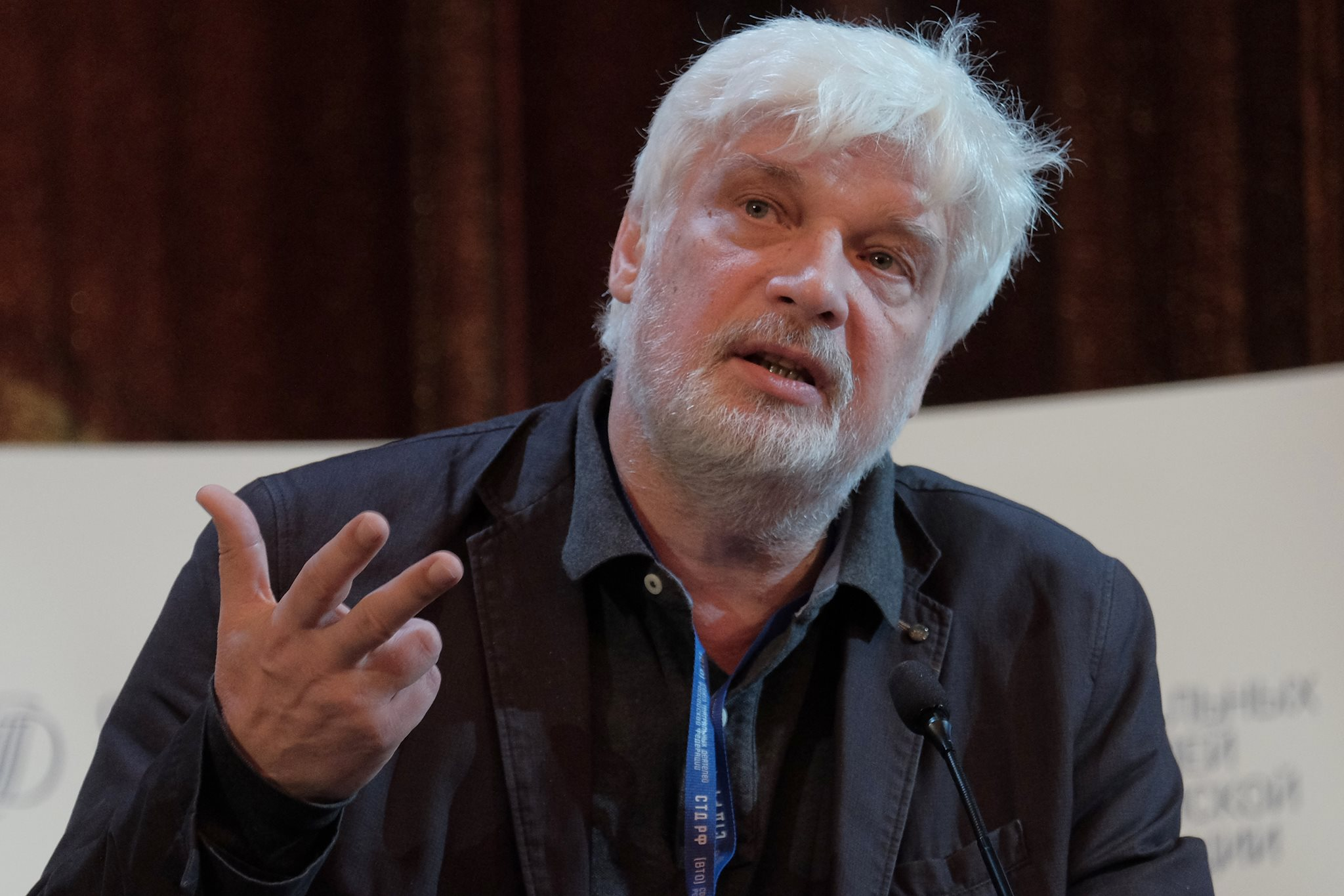 Фоторепортаж VII Съезда и Форума СТД РФ